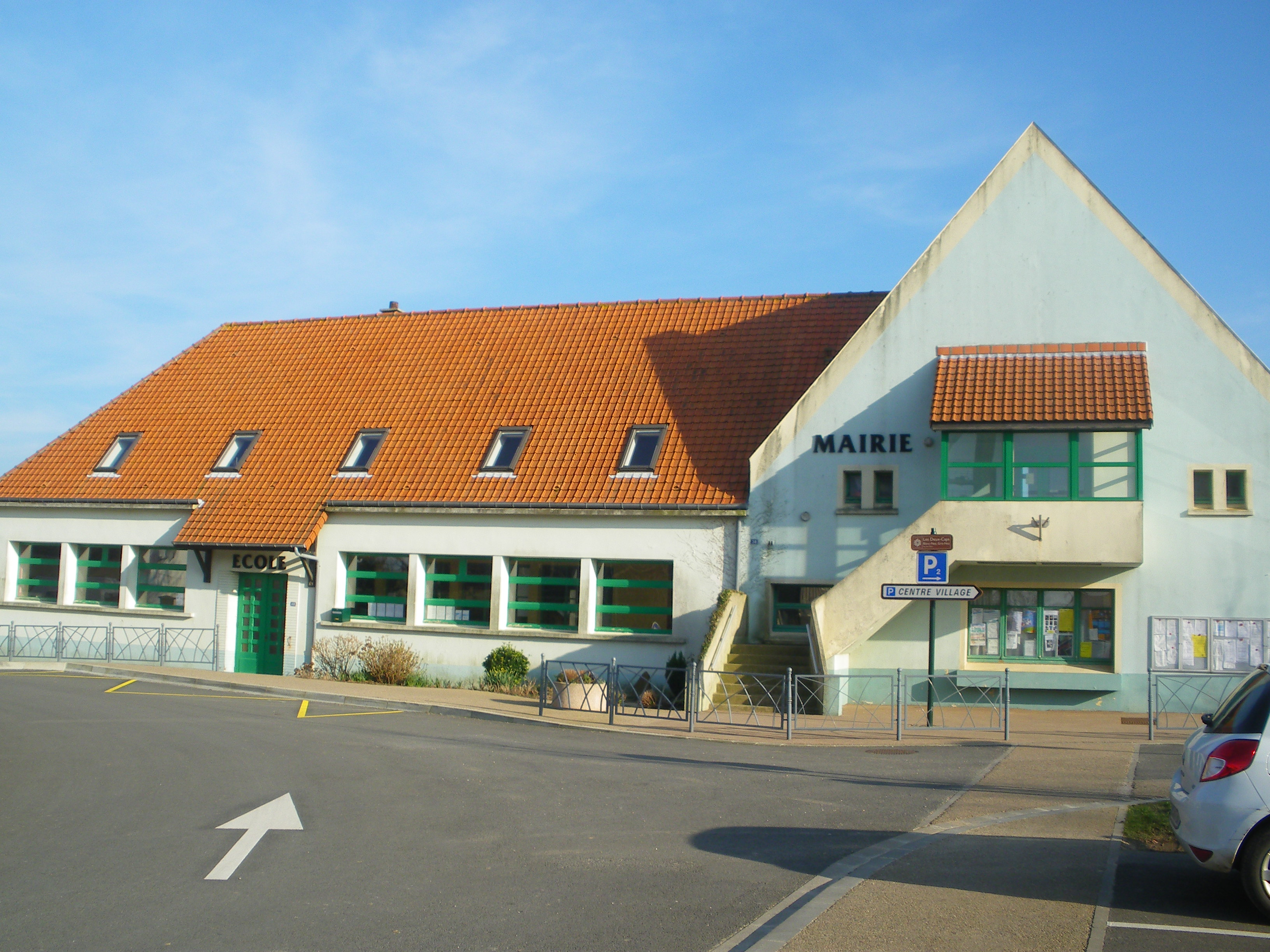 Vue de la mairie-école d'Audinghen.